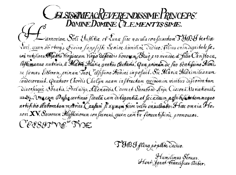 Dédicace en latin des Sonates du Rosaire C90-105 de HIF Biber (1678)